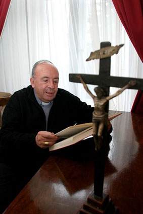 Monseñor Tomás González